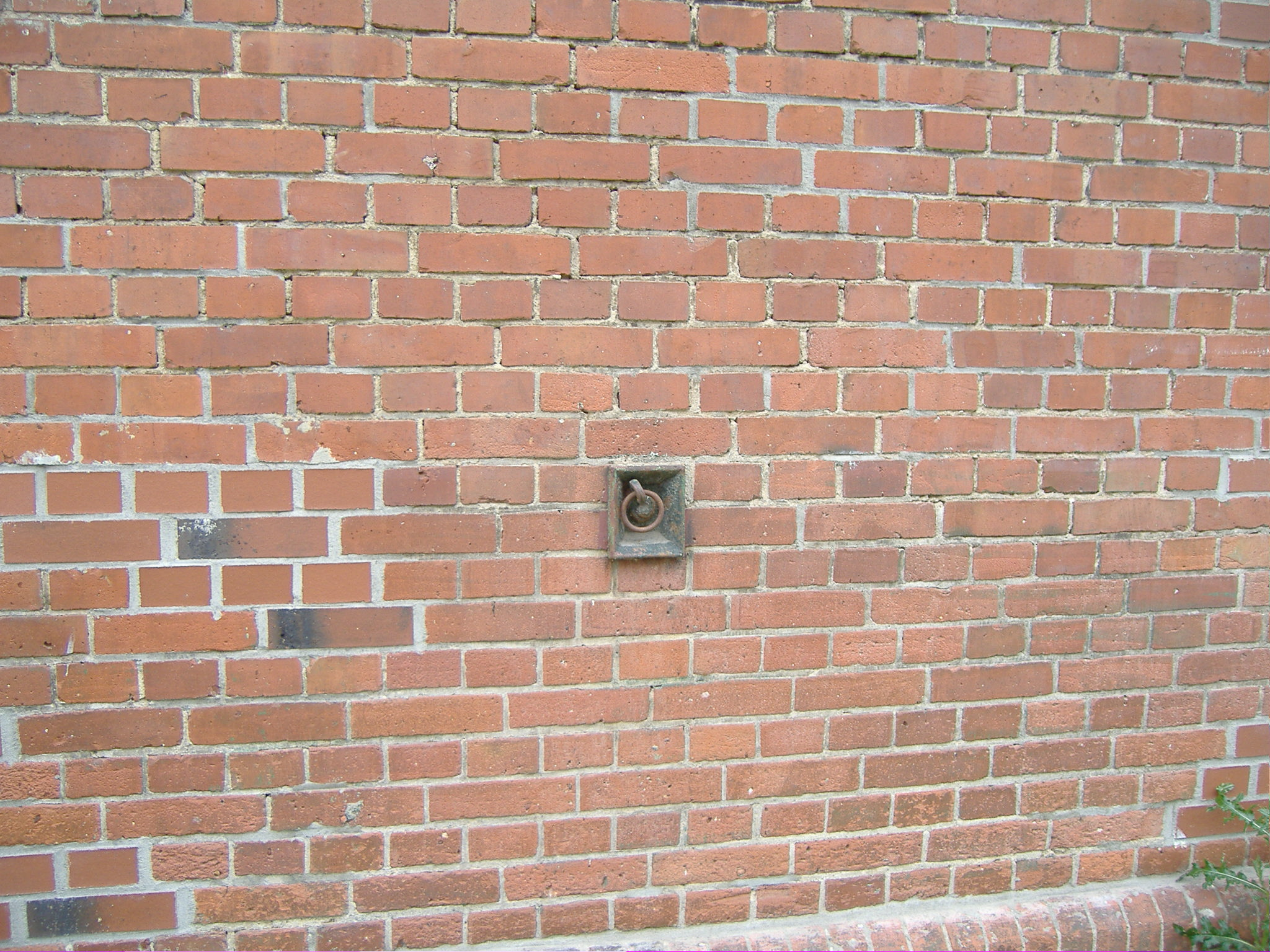 ehem. Reiterkaserne, 1898-1901 gebaut als Paradebeispiel preußischer Kasernenarchitektur, heute Teil der Fachhochschule Leonardo-Campus, Münster, Deutschland Pferde konnten an diese Ösen, die an fast jeder Wand im Geläde angebracht sind, festgebunden werden. Tag des offenen Denkmals, Panoramafreiheit Foto: Elkin Fricke --Managementboy 12:13, 16 September 2005 (UTC)